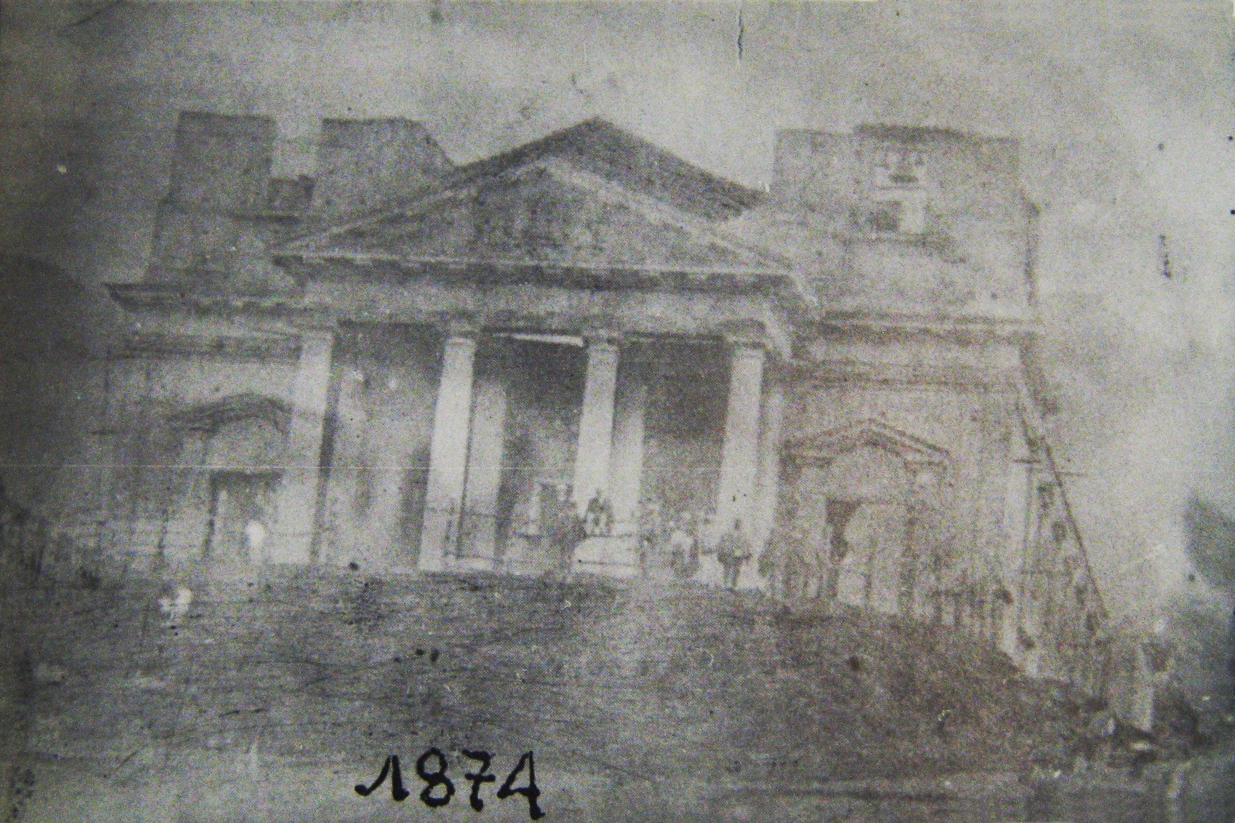 Basílica Menor de Nuestra Señora de la Merced de Yarumal en 1874, Antioquia, Colombia. El templo se encuentra en construcción, se aprecia el pórtico que tenia el proyecto original, el cual se desplomó el 6 de febrero de 1890 y toco suprimirlo totalmente del diseño.